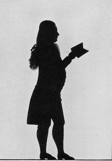 August Siegfried von Goué (oder Goue) (1743-1789). Schattenriss. Braunschweigischer Legtionssekretärin Wetzlar, Gründer der Wetzlaer Rittertafel, der Goethe als "Götz der Redliche" angehörte. Verfasste neben zahlreichen anderen, meist freimaurerischen Werken, das Trauerspiel "Masuren oder der junge Werther" (1775. Hierin wird der Selbstmord des jungen Jerusalem aus den Tatsachen erklärt.